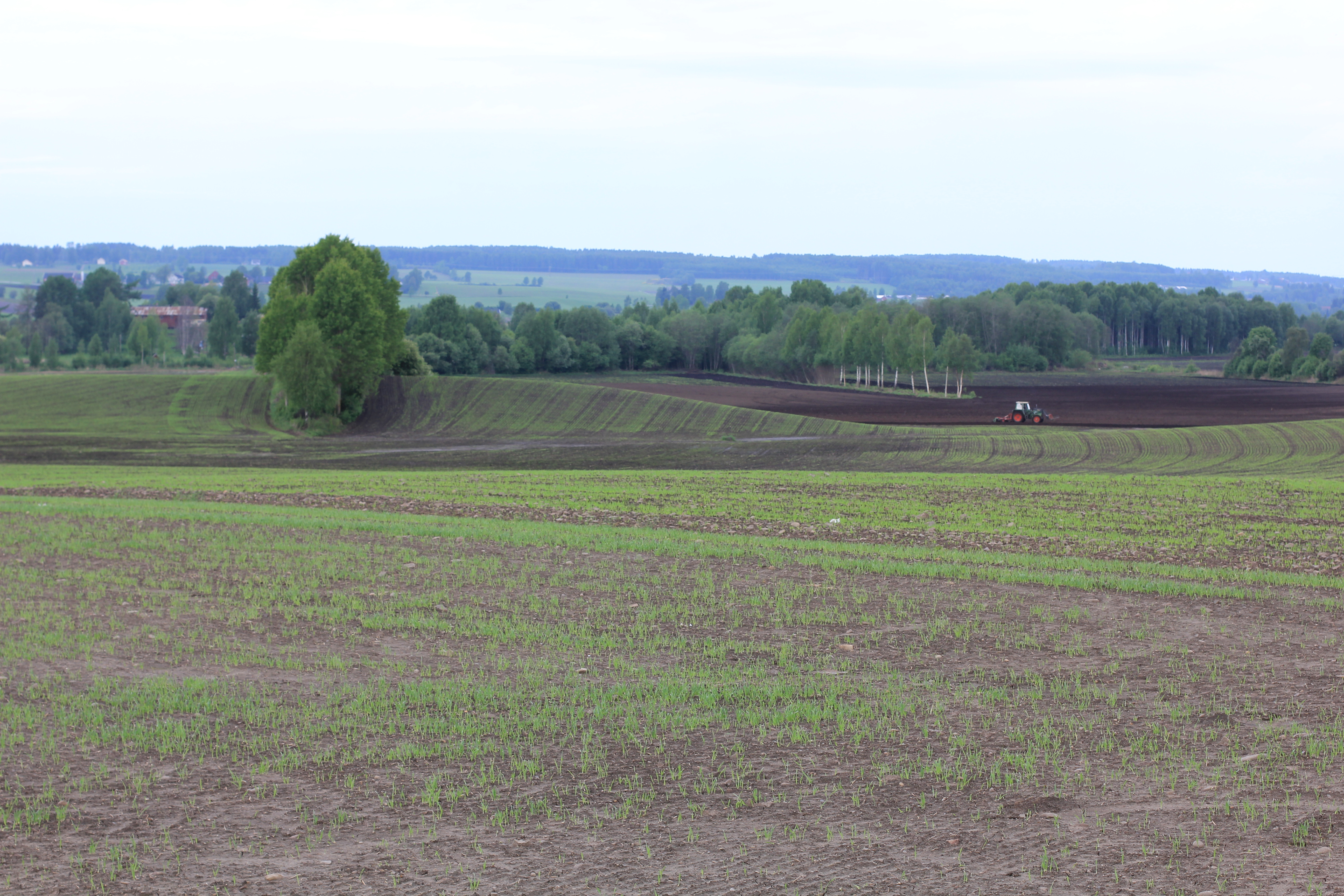 Våronn på Løten, Hedmark.